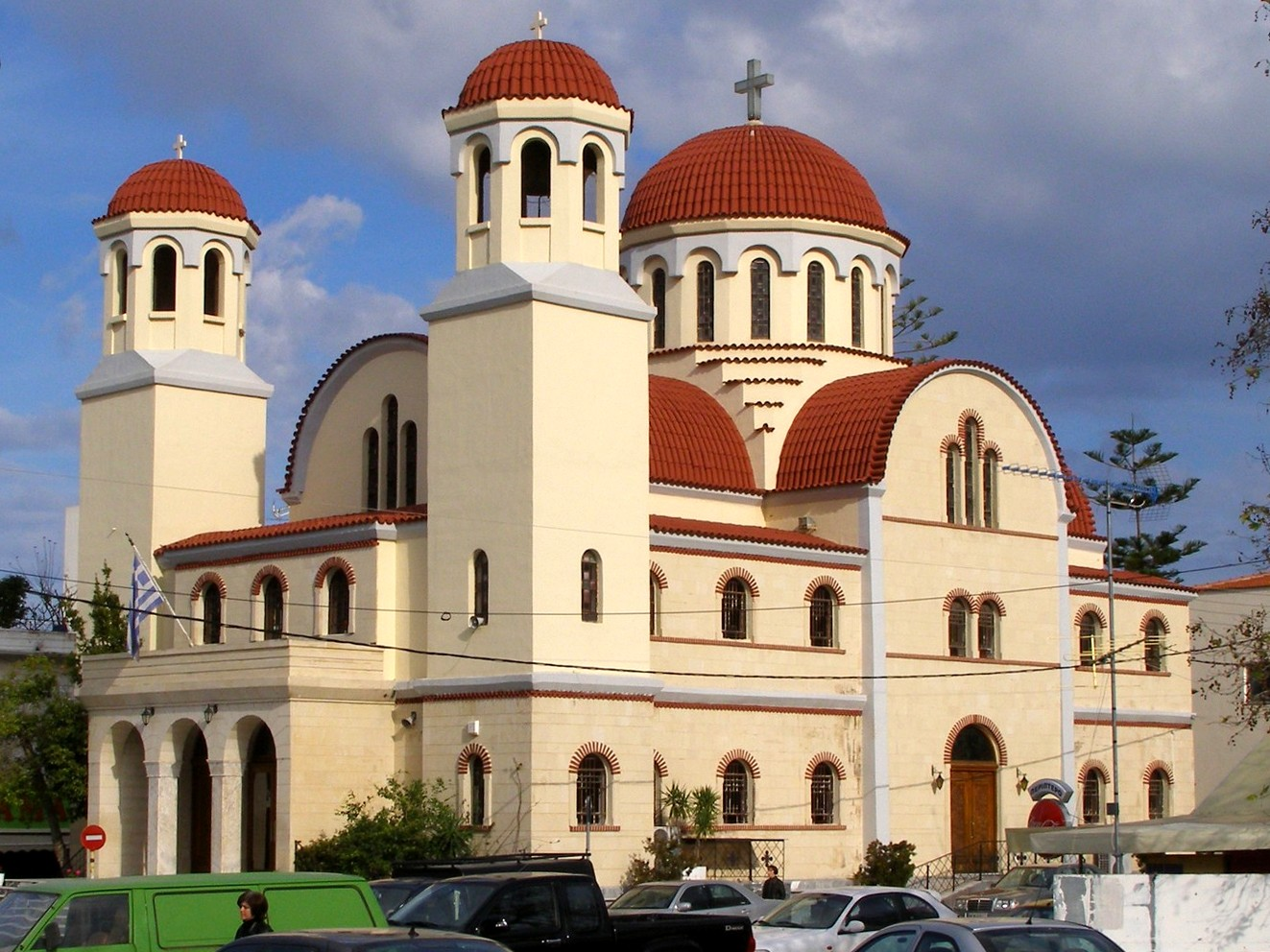 Kirche "Tessaron Martyron ("der vier Märtyrer") in Rethymno, Kreta